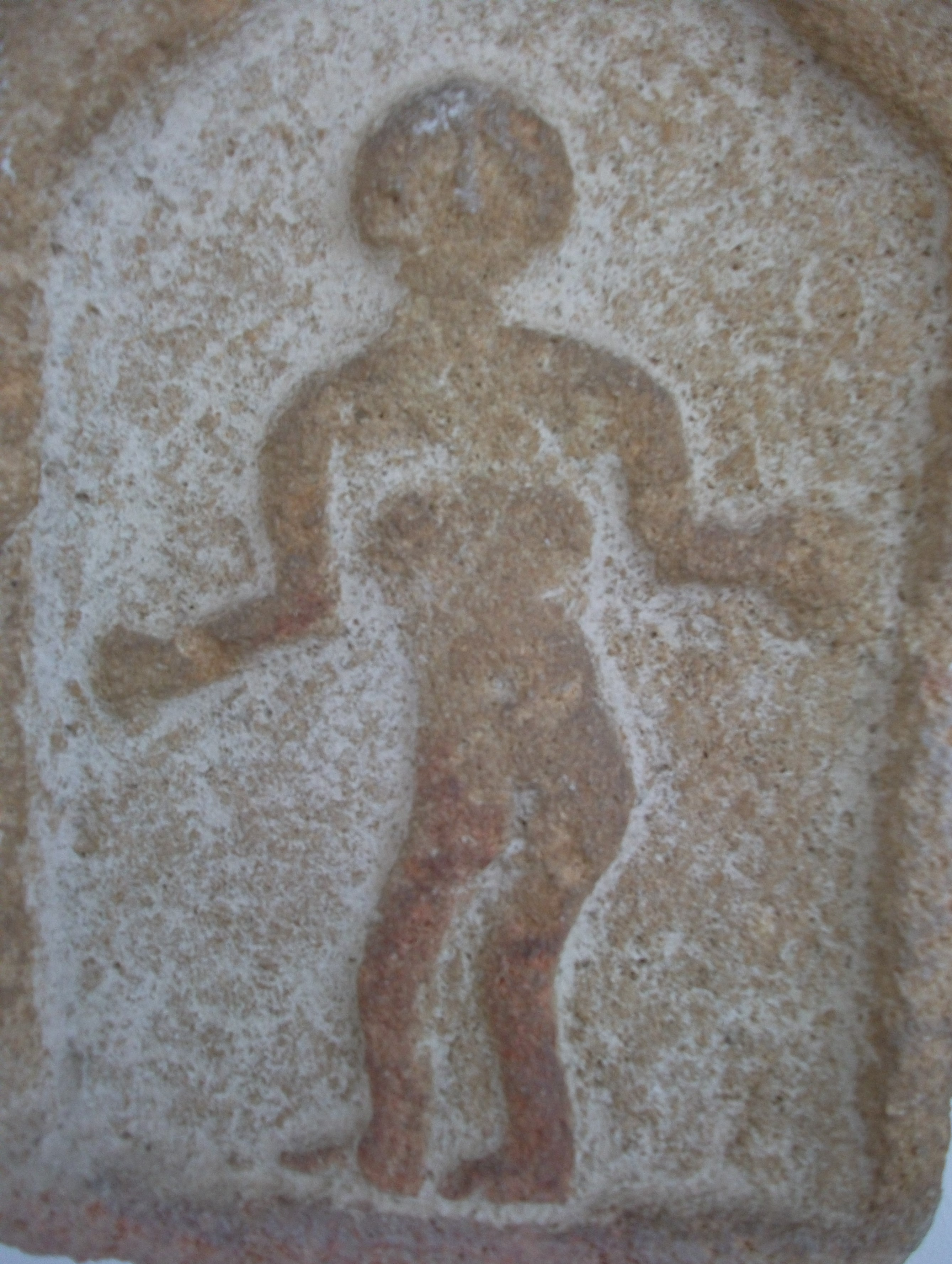 Stele mit weiblicher Figur, Arch. Museum, Rabat